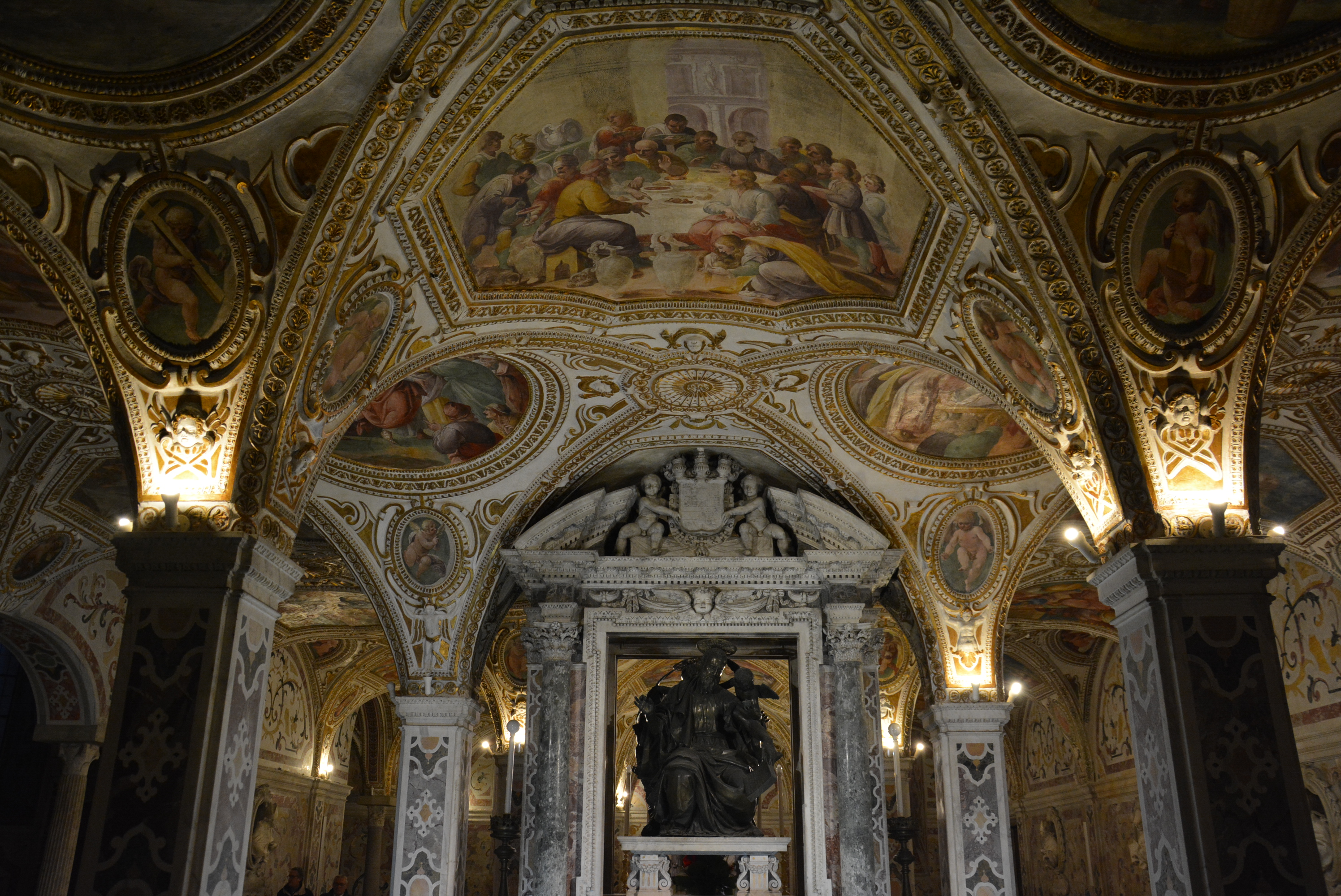 Cripta della cattedrale di Salerno